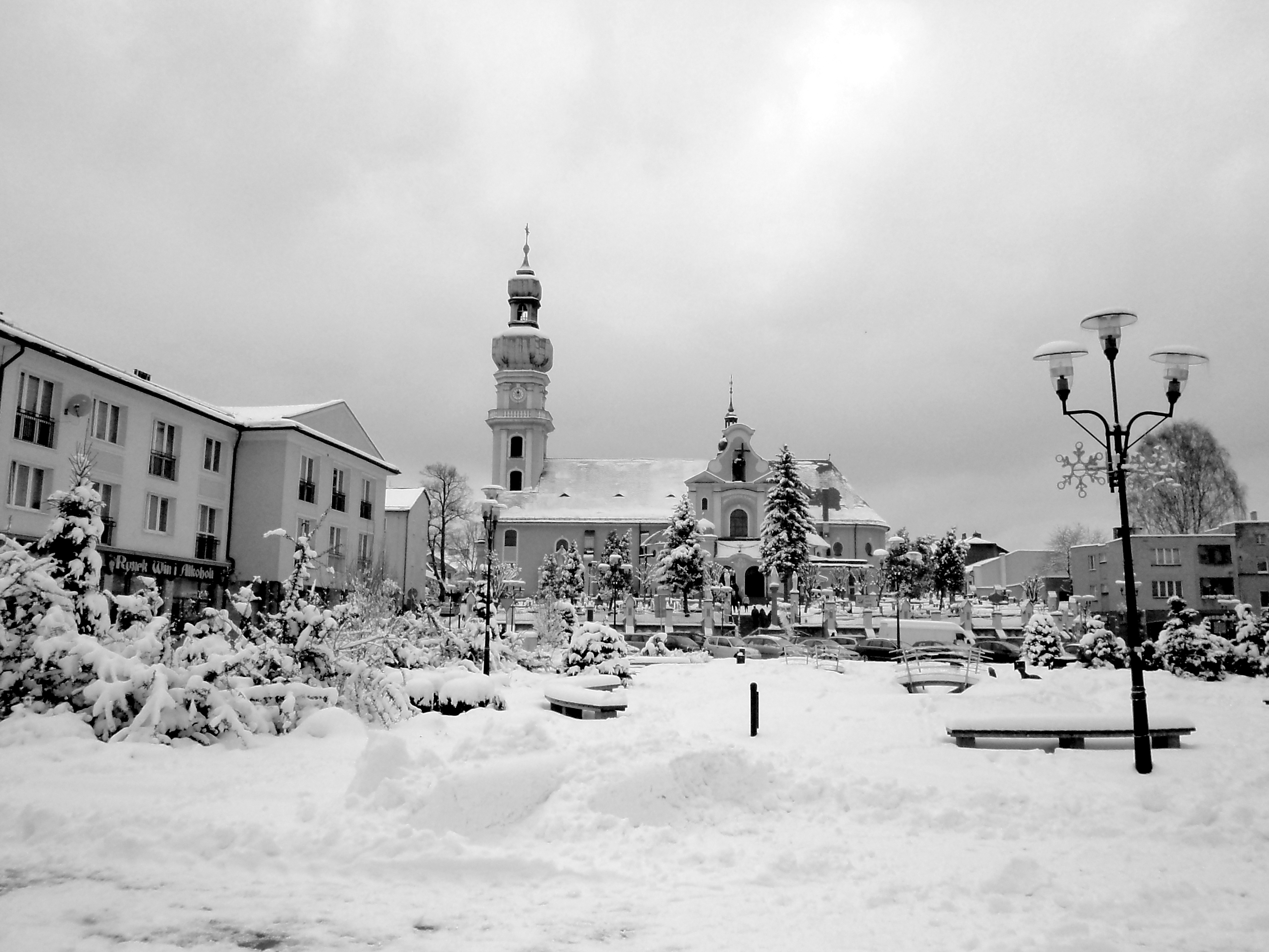 Miasto na prawach powiatu na południu Polski, położone na Górnym Śląsku.